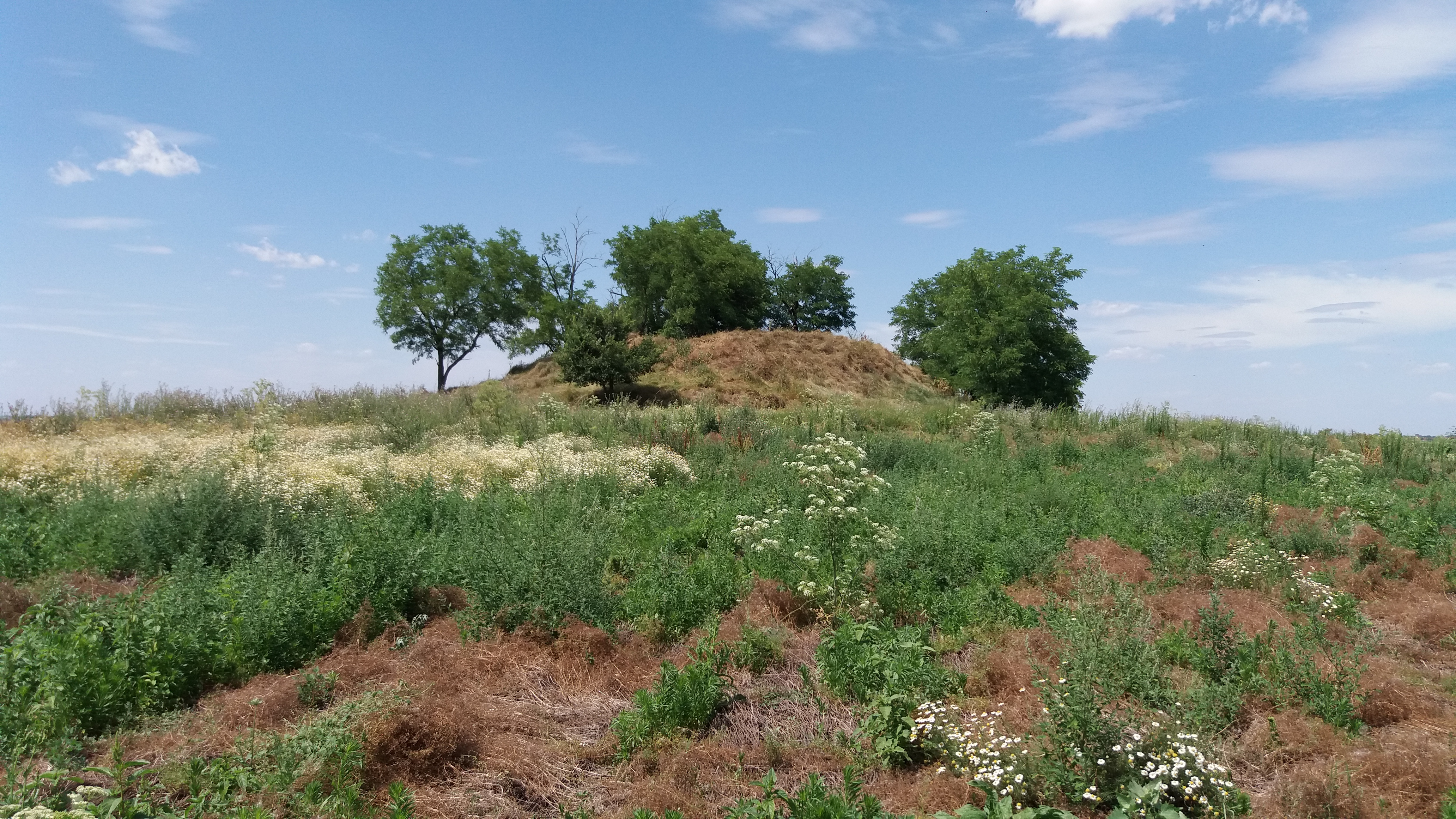 földhalom